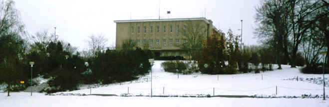 Stadshuset i Mariehamn (december 2002)